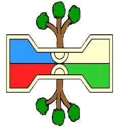 Glifo de San Agustín Tlaxiaca, Hidalgo